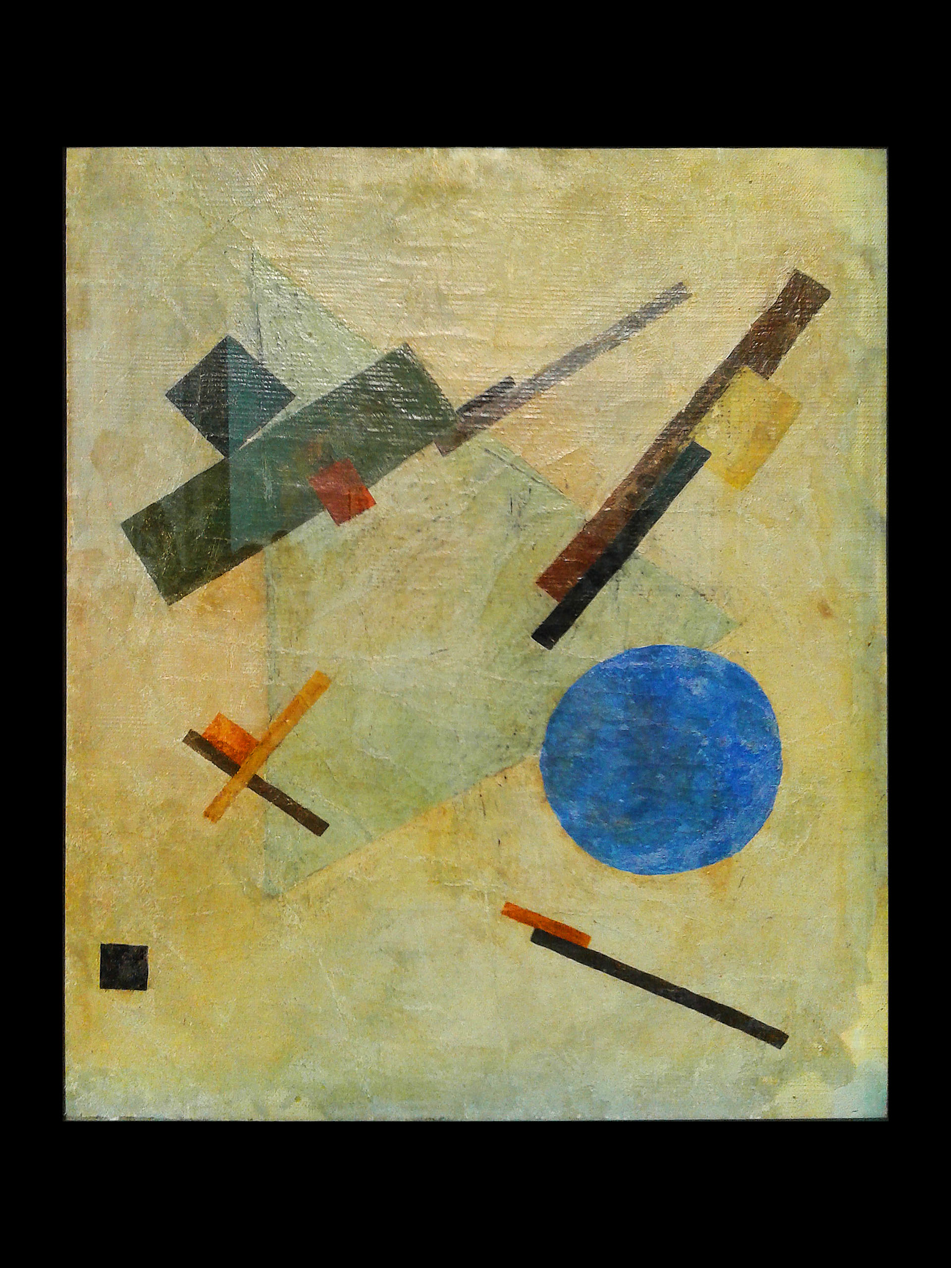 Казимир Малевич. Супрематична композиція 1, 1916. Полотно, олія